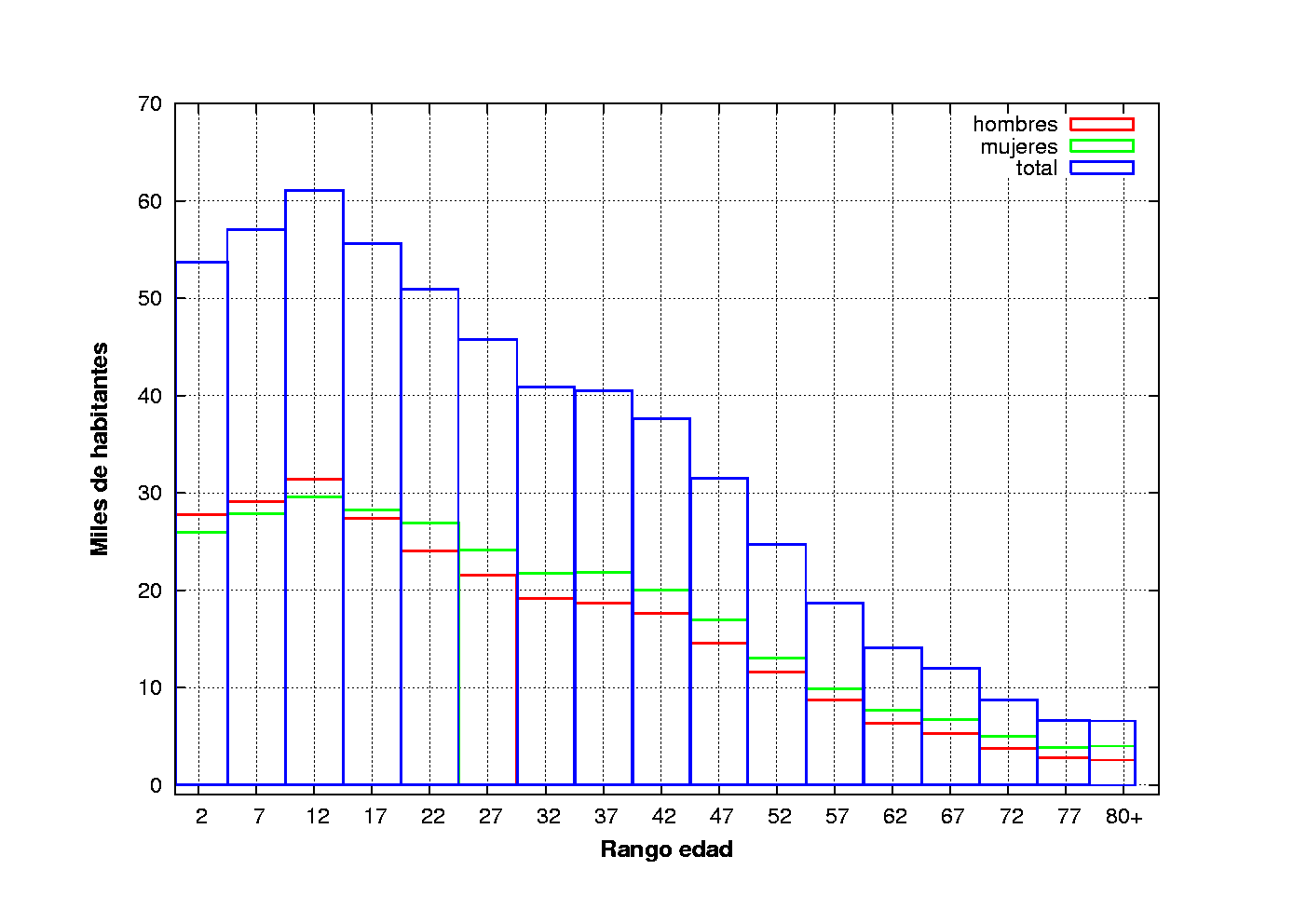 Distribución Población Cúcuta por edad y sexo.